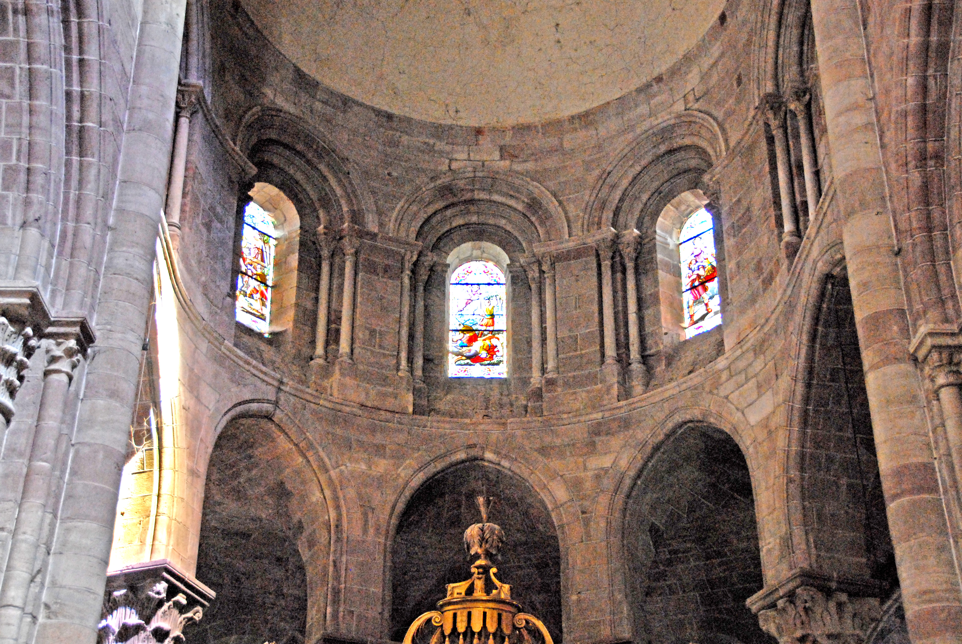 St.-Julien Brioude, Chorapsis